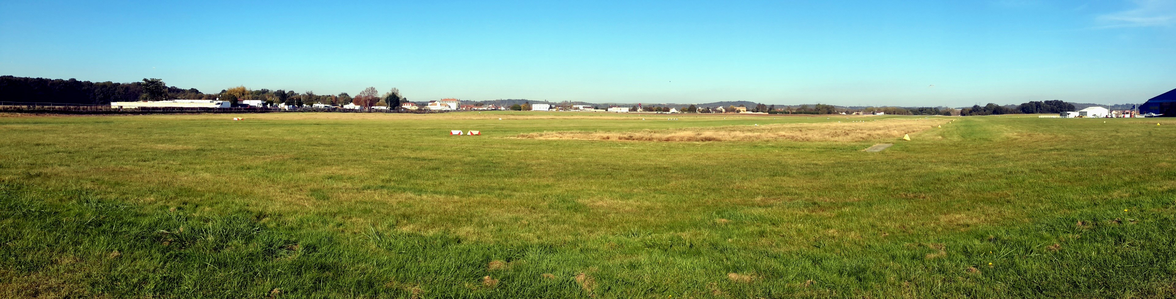 Aérodrome de Chelles - Le Pin, Chelles, Seine et Marne, France. Les pistes.